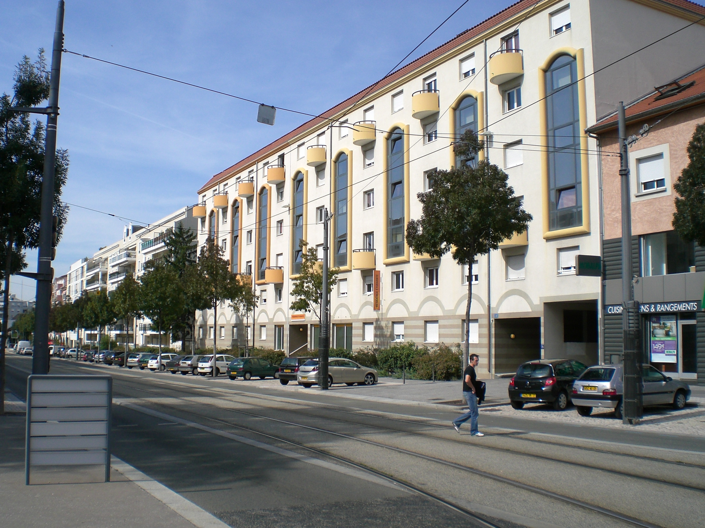 A Bron, Bâtiments de l'Avenue Franklin Roosevelt.